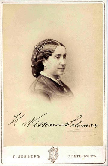 Генрієтта Ніссен-Саломан (1819 - 1879). шведська співачка та музичний педагог